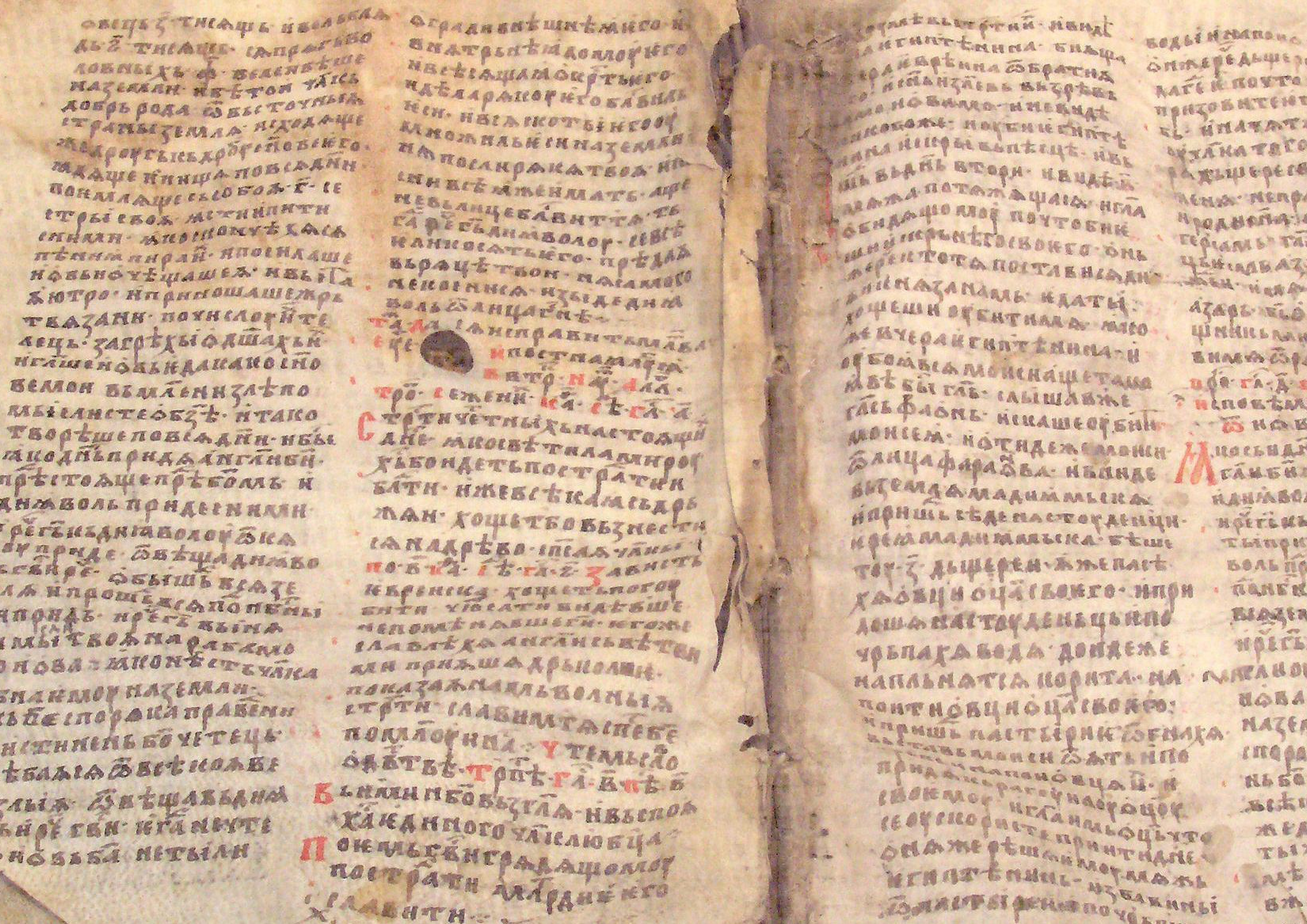 Кюстендилски триод